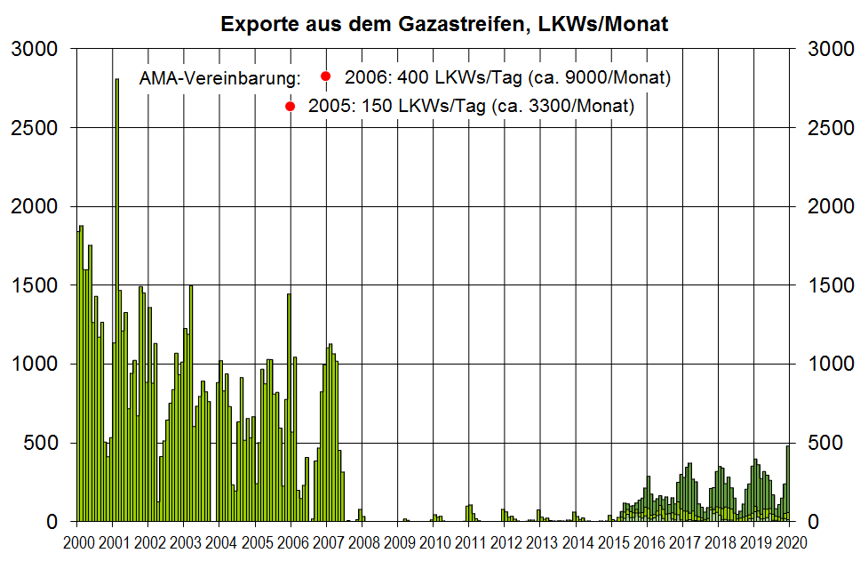 Diagramm: Exporte aus dem Gazastreifen in den Jahren 2000 bis 2012